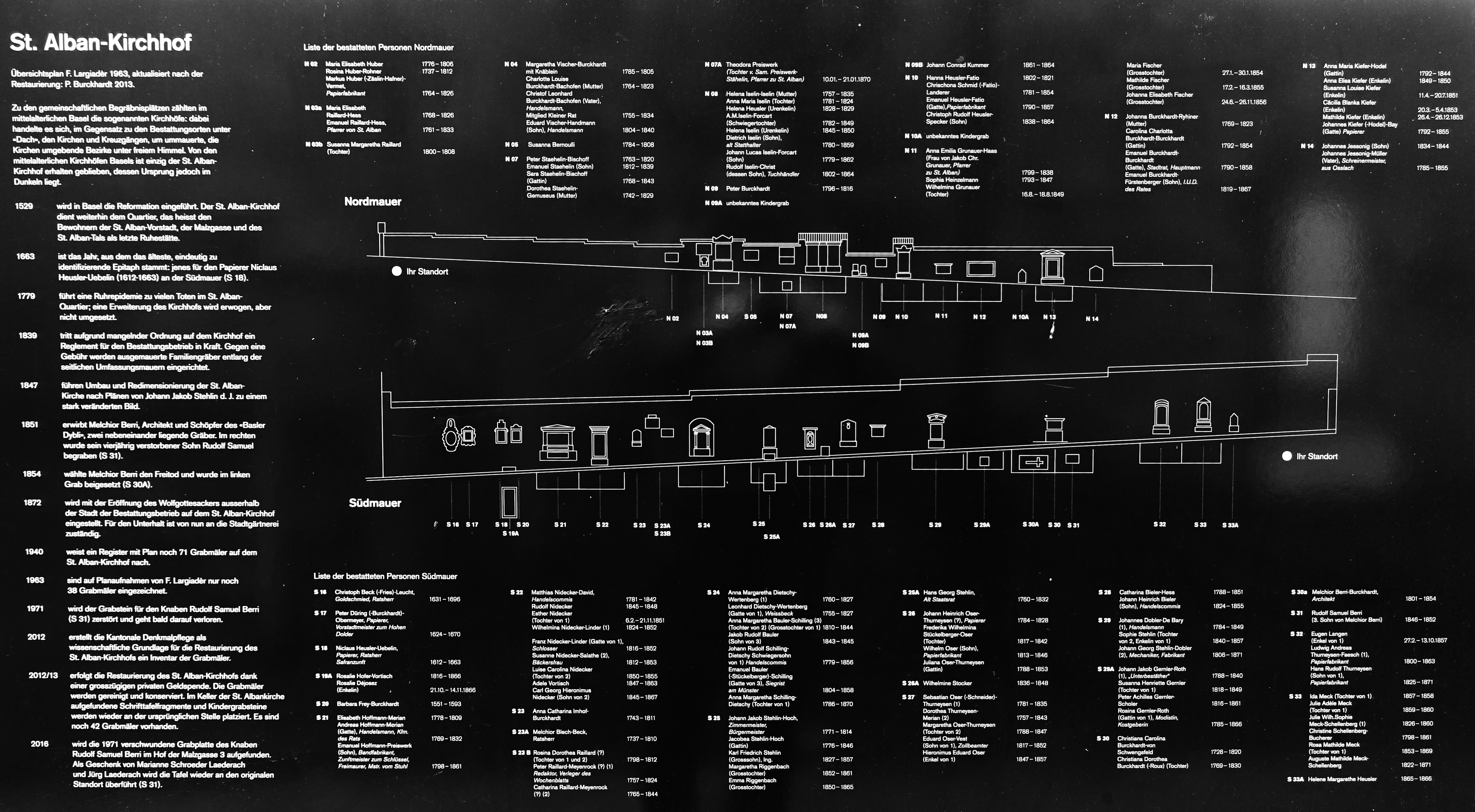 Übersichtsplan des Basler St. Alban-Kirchhof und deren Gräber